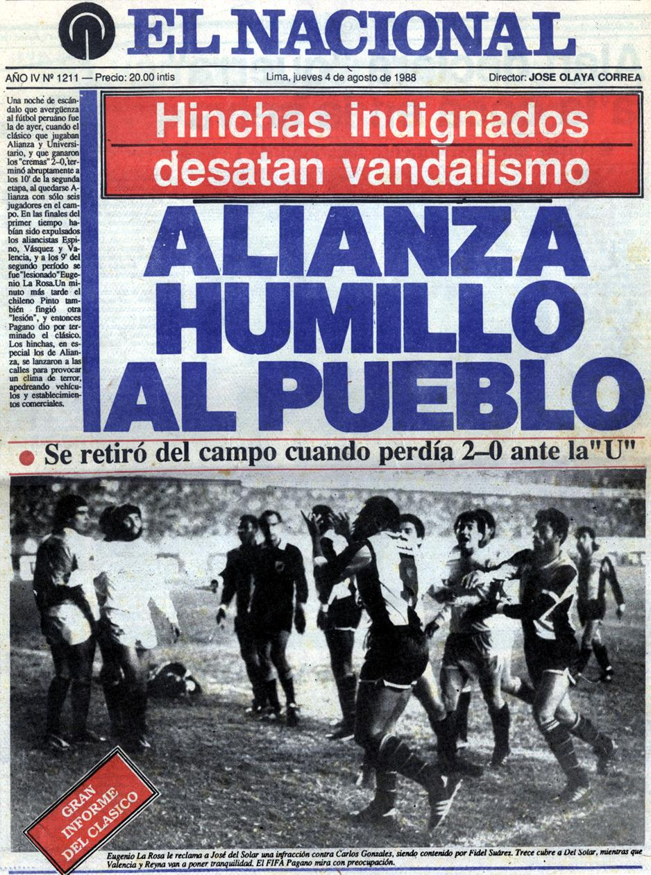 Portada de Diario el Nacional